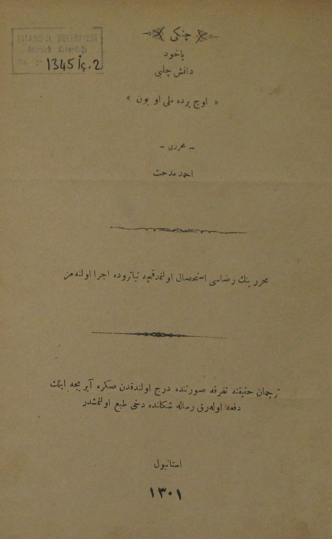 Çengi, 1877'de yayımlanan Ahmed Midhat Efendi romanı. İlkin Tercüman-ı Hakikat gazetesinde tefrika edilmiş, ardından kitap olarak yayımlanmıştır. Romanın ilk bölümü yedi yıl sonra 1884'te, olaylar Ahmet Mithat Efendi tarafından müzikli bir sahne eseri haline getirilmiş ve "Çengi Daniş Çelebi-üç perde milli oyun" adıyla kitap halinde basılmıştır